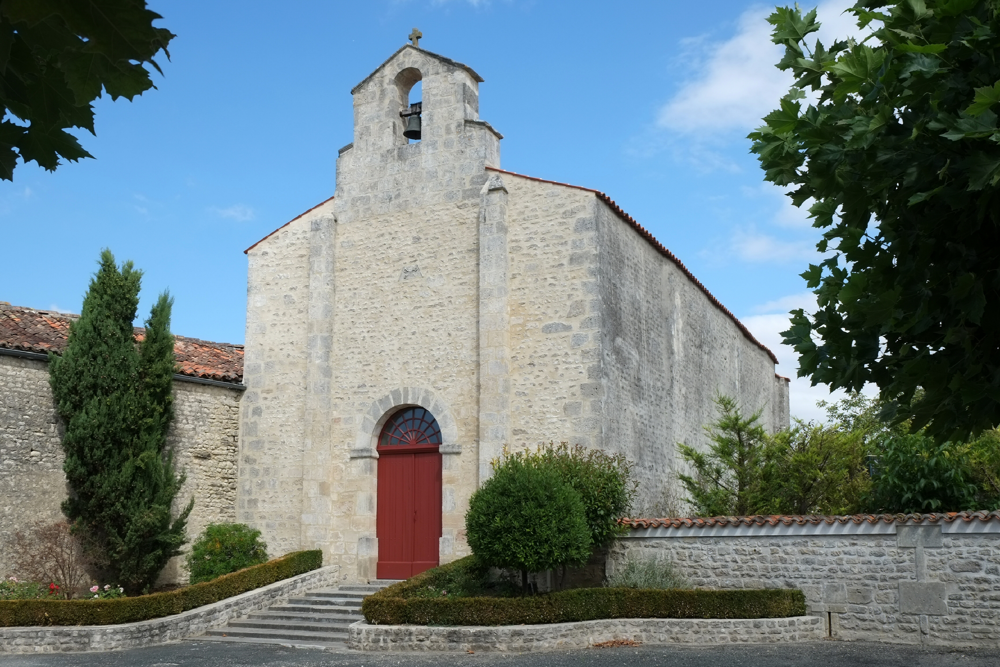 Église Saint-Pierre Le Gicq Charente-Maritime France